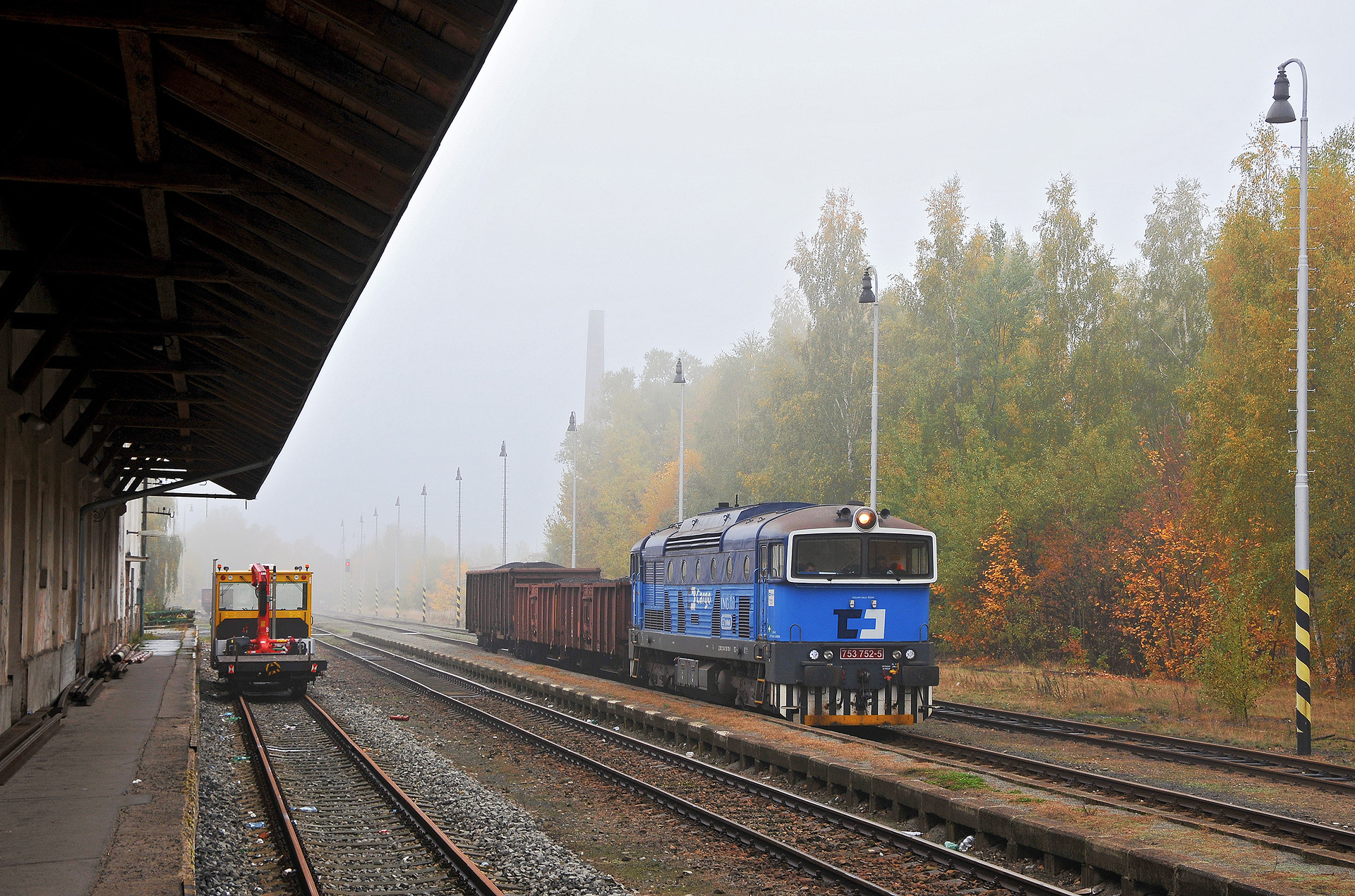 Lokomotiva 753.752 dopravce ČD Cargo v čele manipulačního vlaku Česká Lípa - Rybniště v železniční stanici Nový Bor.